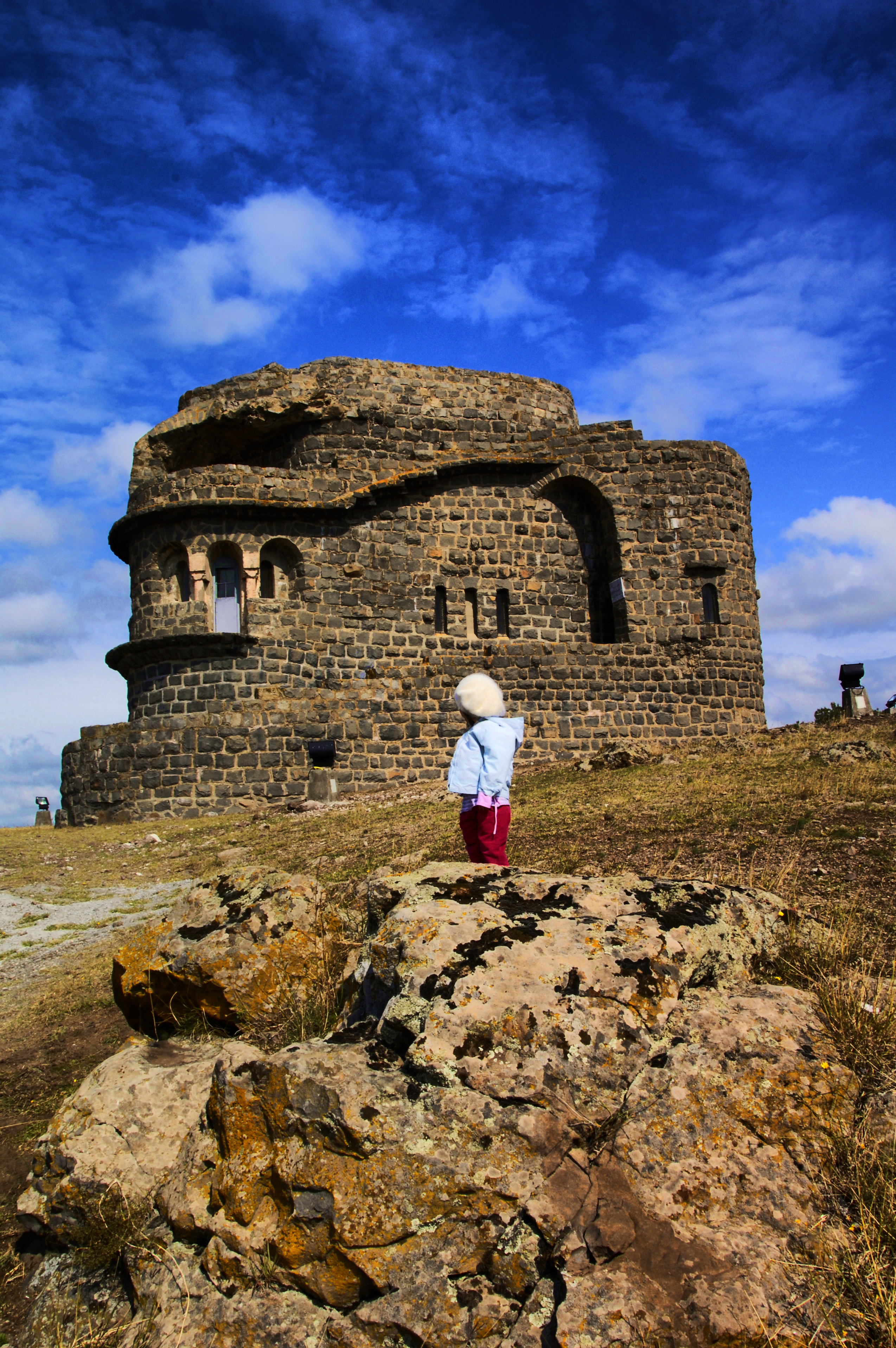 Споменикот Ѕебрњак во атарот на с. Младо Нагоричане. Изграден е во 1937 година, по повод 25 години од Кумановската битка од 23 и 24 октомври 1912 година (Прва балканска војна), помеѓу Турската вардарска армија и Првата српска армија. Во оваа битка турската војска е победена и била принудена да се повлекува.